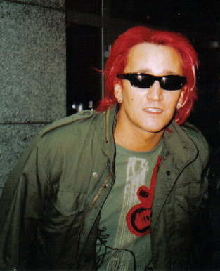 Michał Wiśniewski (ur. 9 września 1972 w Łodzi) – polski wokalista, autor tekstów, lider grup: Ich Troje, Troje, Red Head .